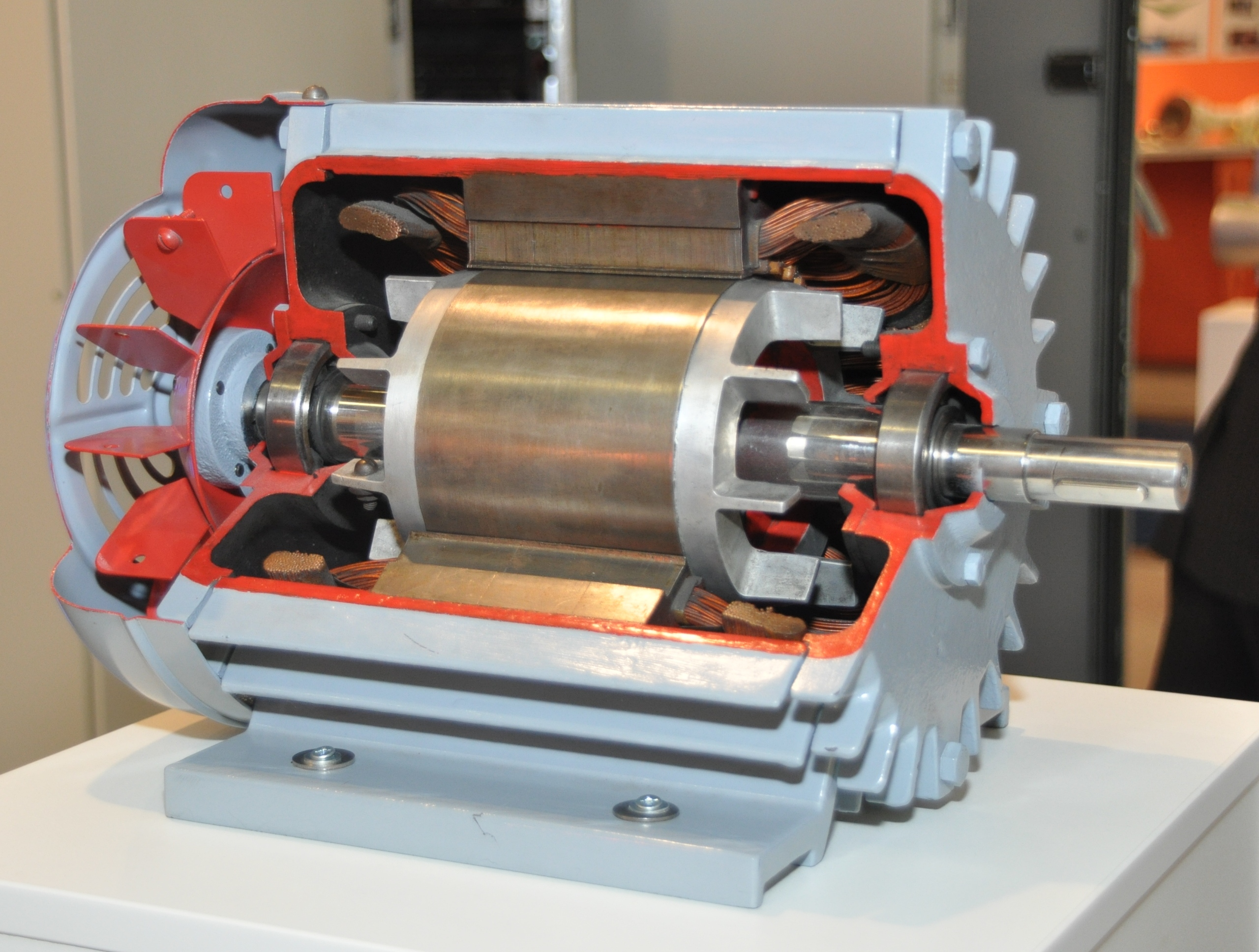 Opengewerkte elektromotor